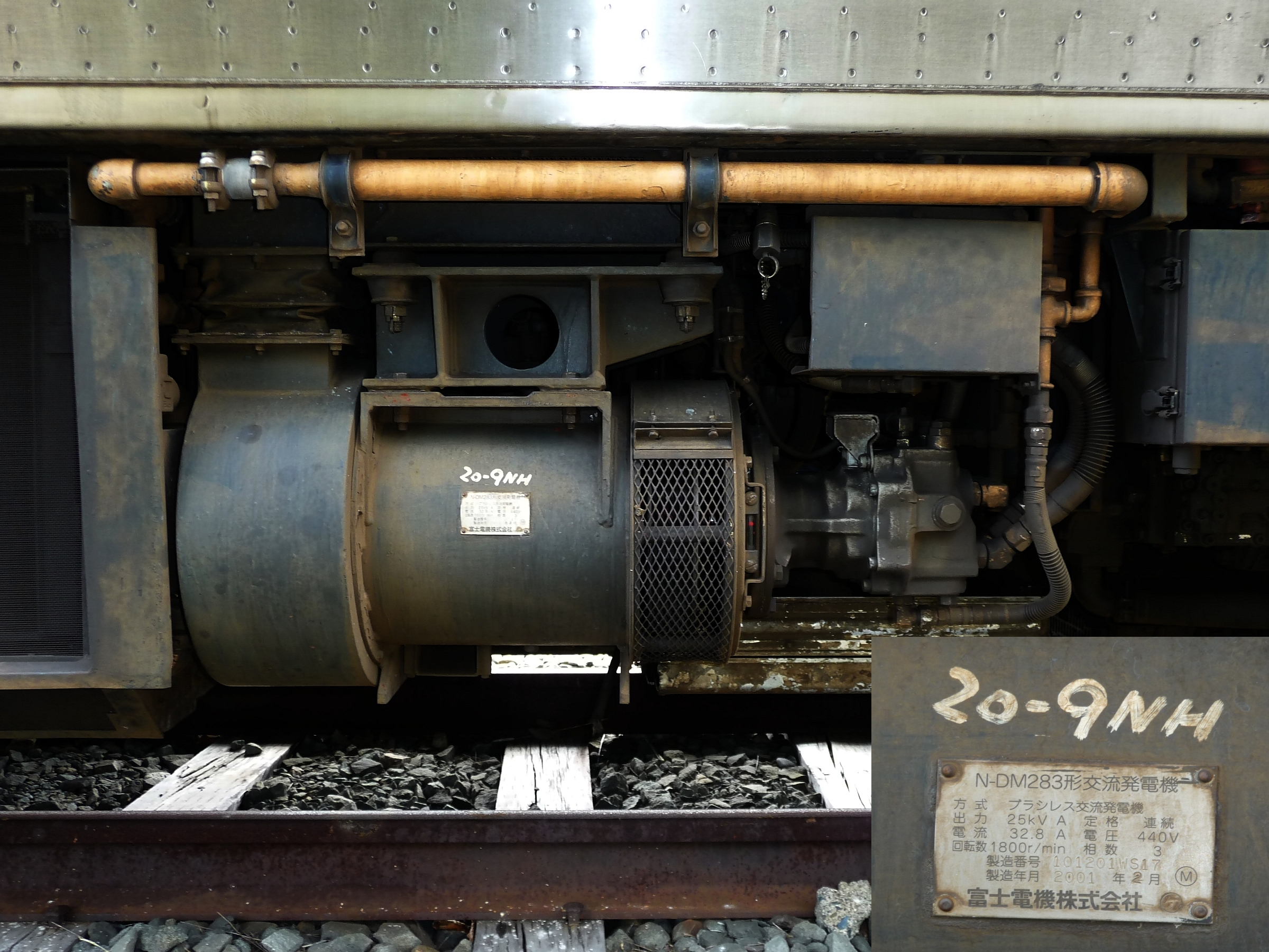 JR北海道キハ283系に搭載されている、油圧駆動式発電機 釧路運輸車両所の一般公開で撮影